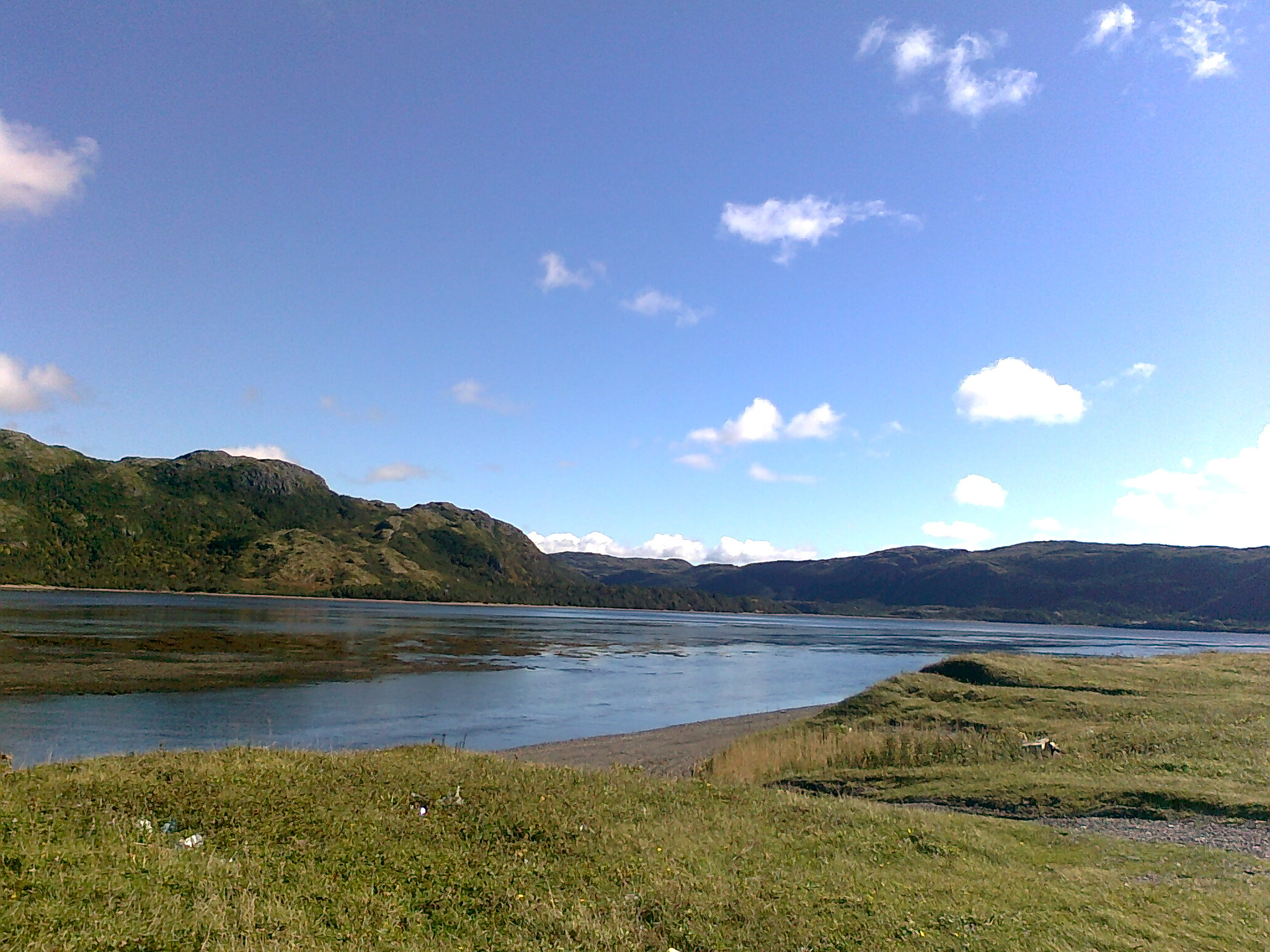 Terrenceville